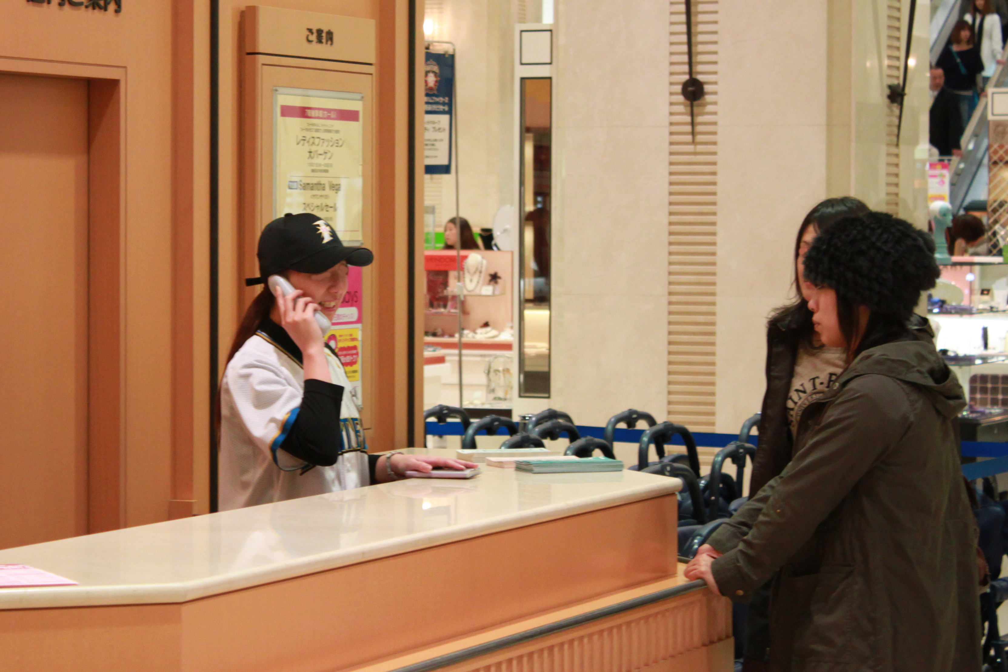 ファイターズ優勝につき、大丸デパート札幌の受付嬢もユニフォーム姿に！ @ DAIMARU Sapporo.